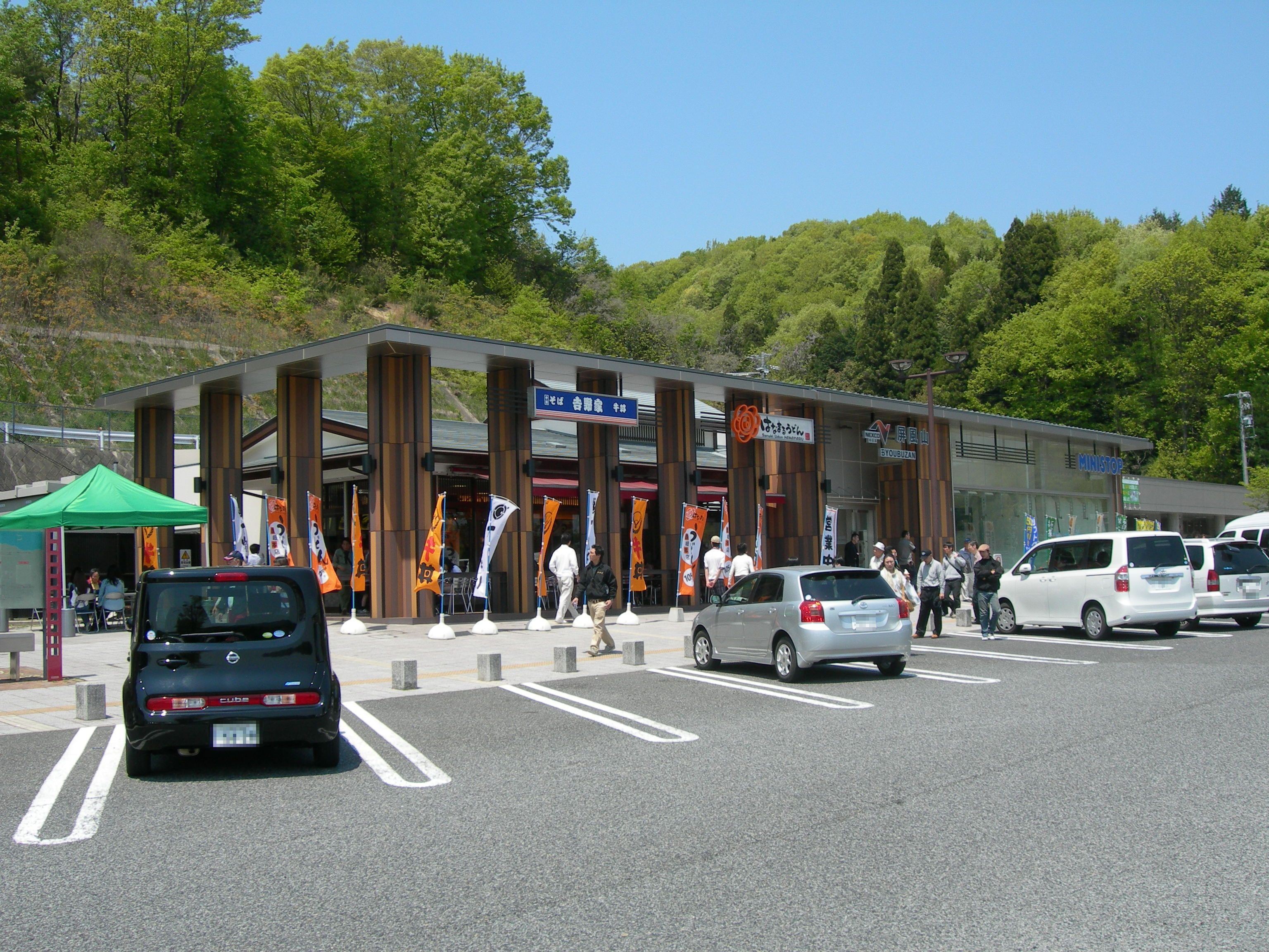 屏風山パーキングエリア 上り線施設